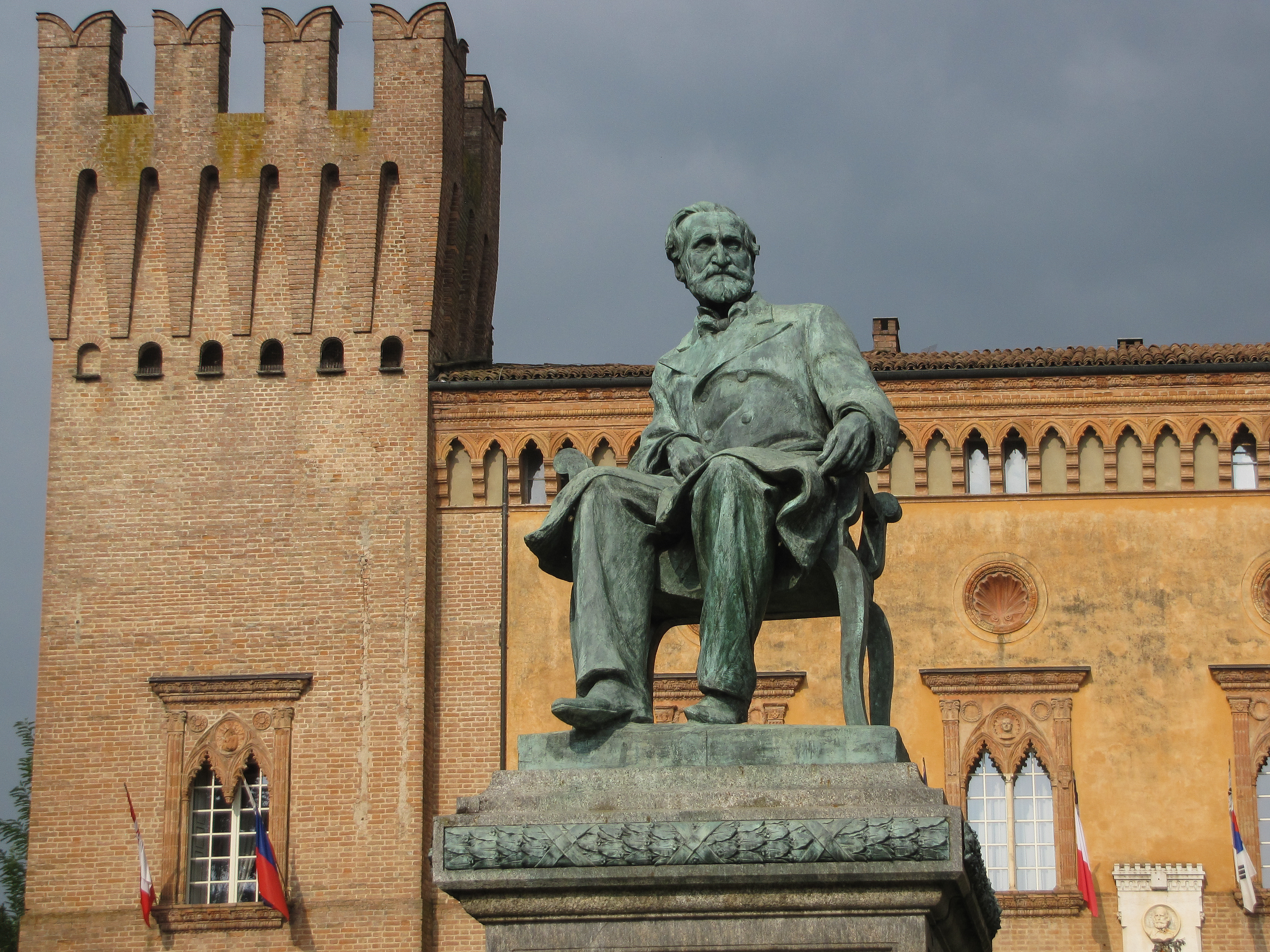 monumento a Giuseppe Verdi This is a photo of a monument which is part of cultural heritage of Italy.